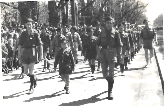 צבי מריאנסי במצעד כסגן מפקד תנועת הצופים בגדנסק – פולין 1950